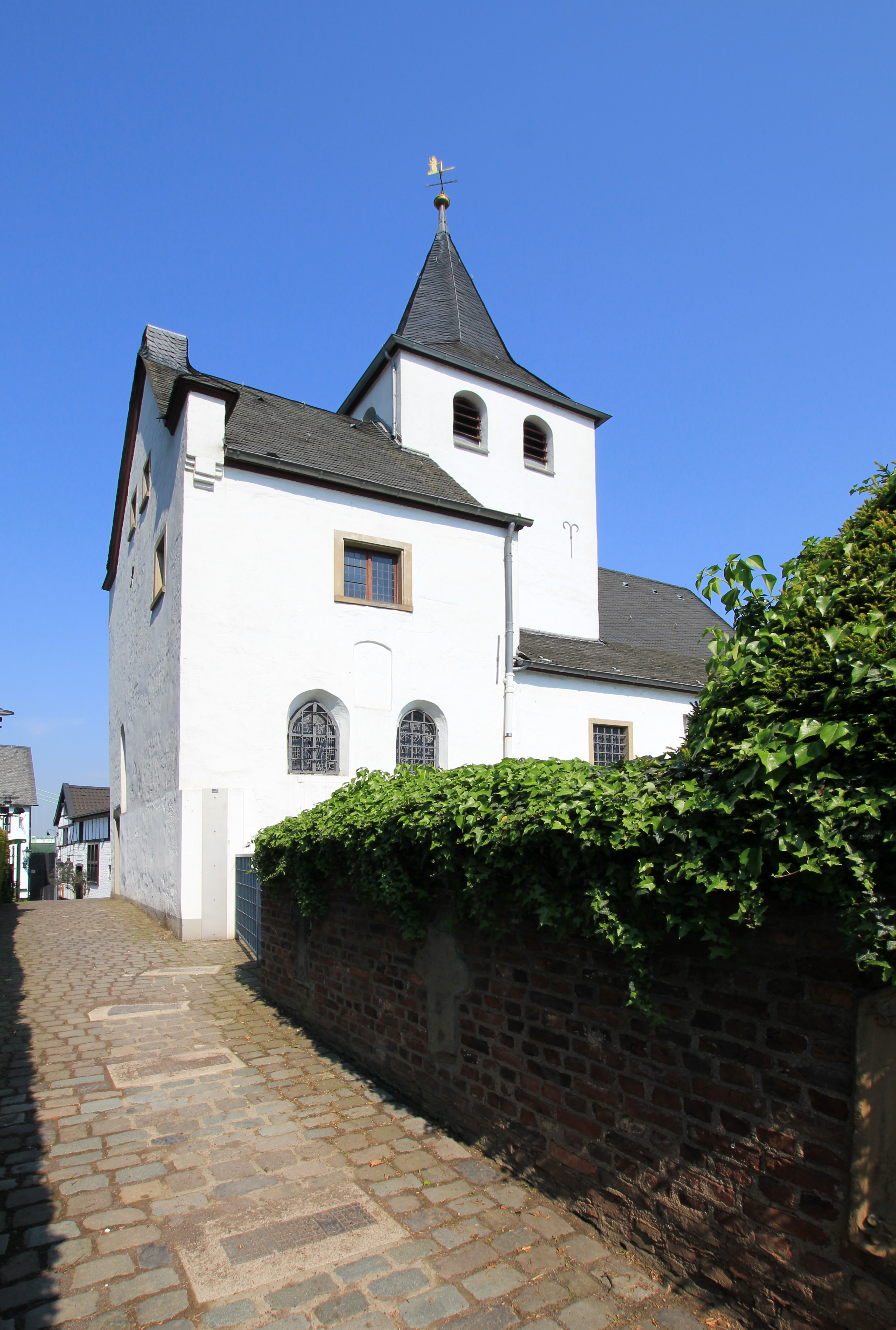 Alt Sankt Maternus, Köln-Rodenkirchen This is a photograph of an architectural monument.